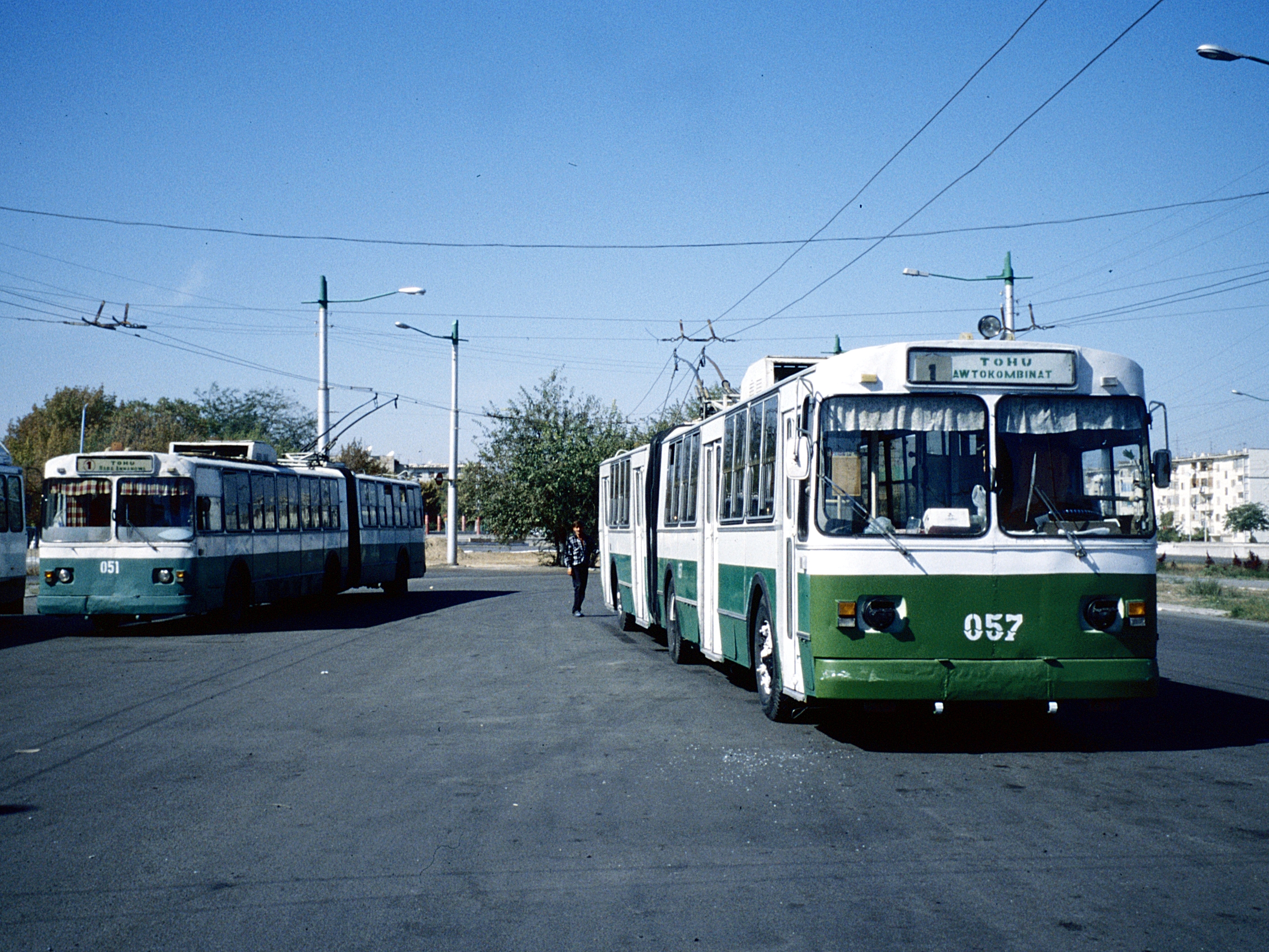 Blick auf den Betriebshof des O-Bus-Depots Aschgabat im September 2000